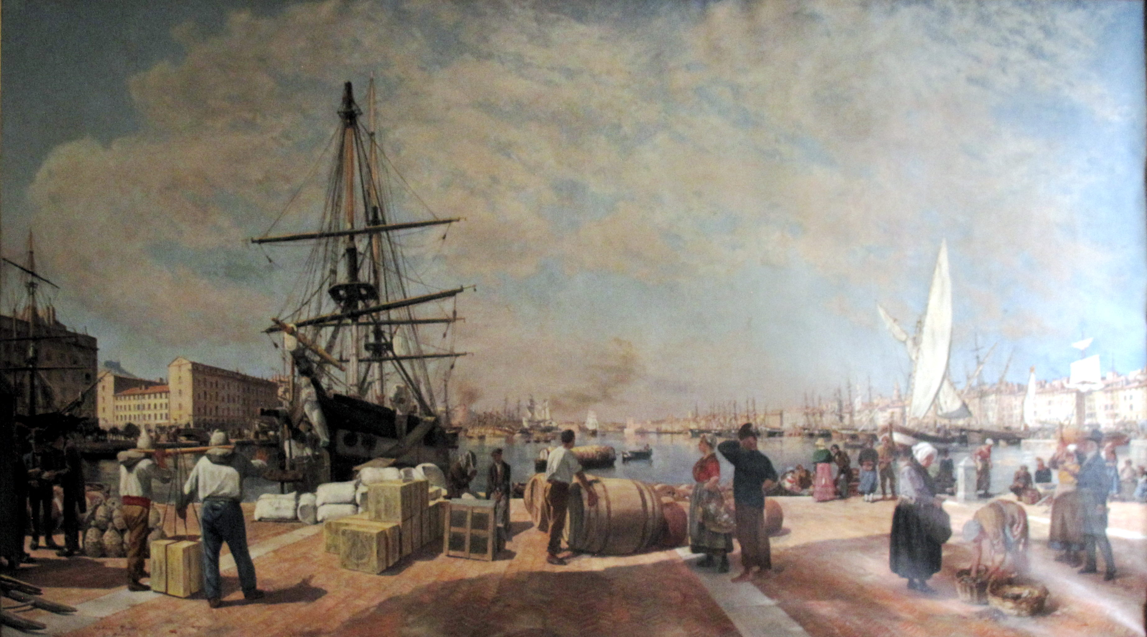 Marseille harbour.